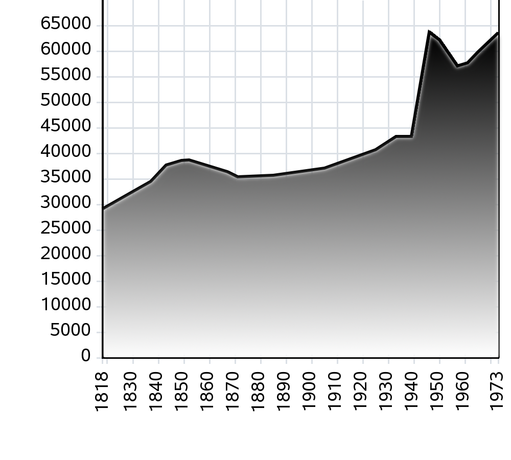 Büren District: Population Statistic